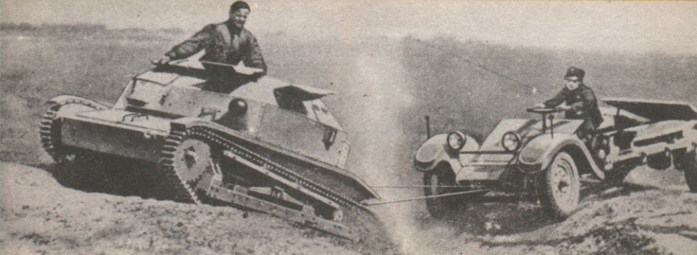 Tankietka TK-3 ciągnie kołowe podwozie (tzw. "autotransport drogowy" dla czołgu TK-3.